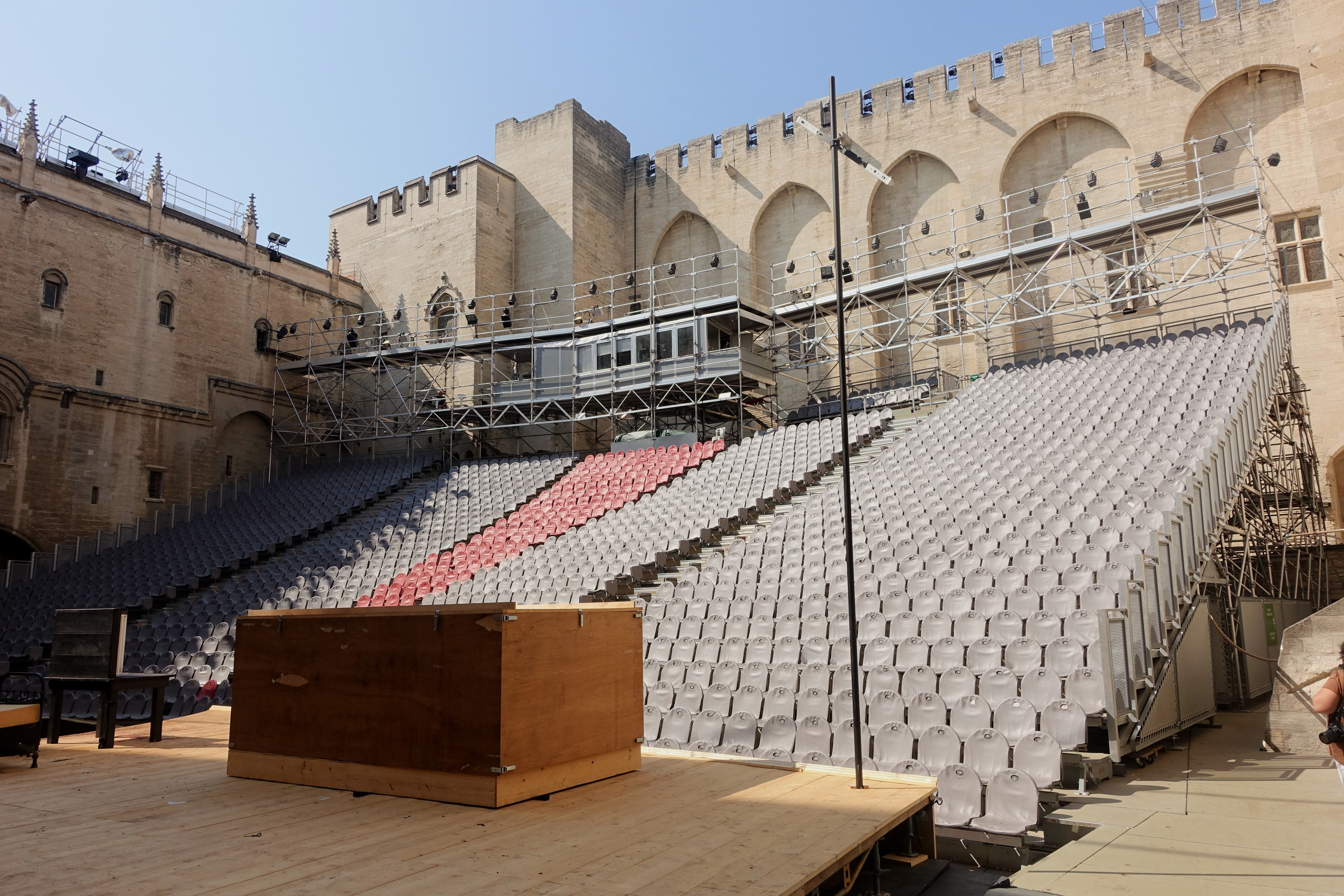 La Cour d'Honneur du Palais des Papes pendant le Festival d'Avignon (juillet 2015)